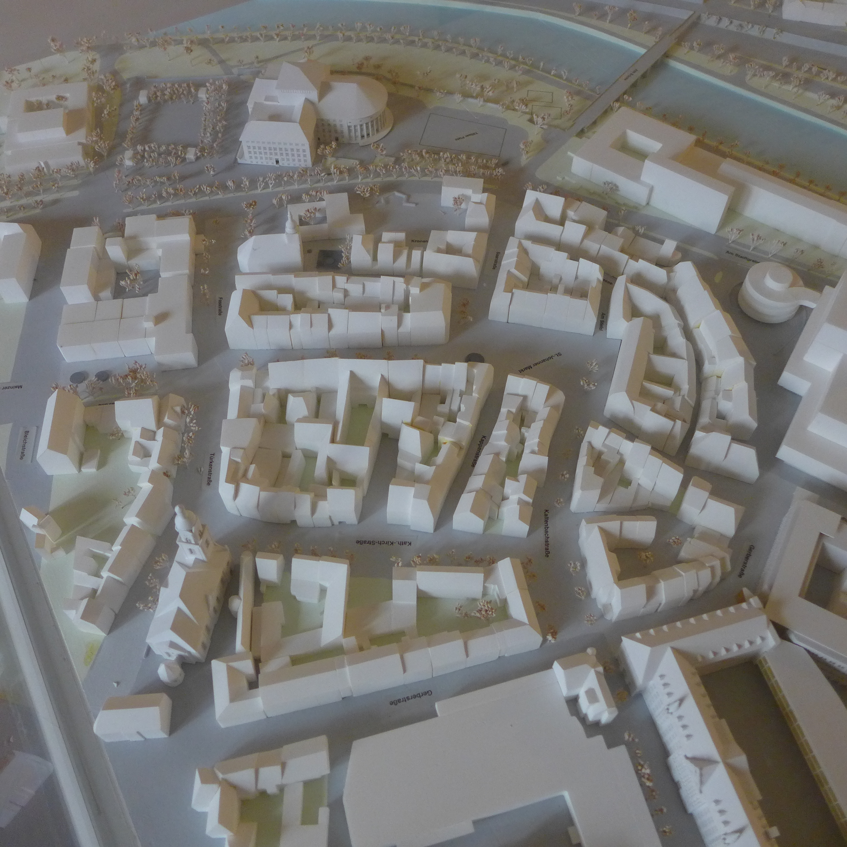 St. Johann, Altstadtkern, Stadtmodell Saarbrücken (Rathaus St. Johann)